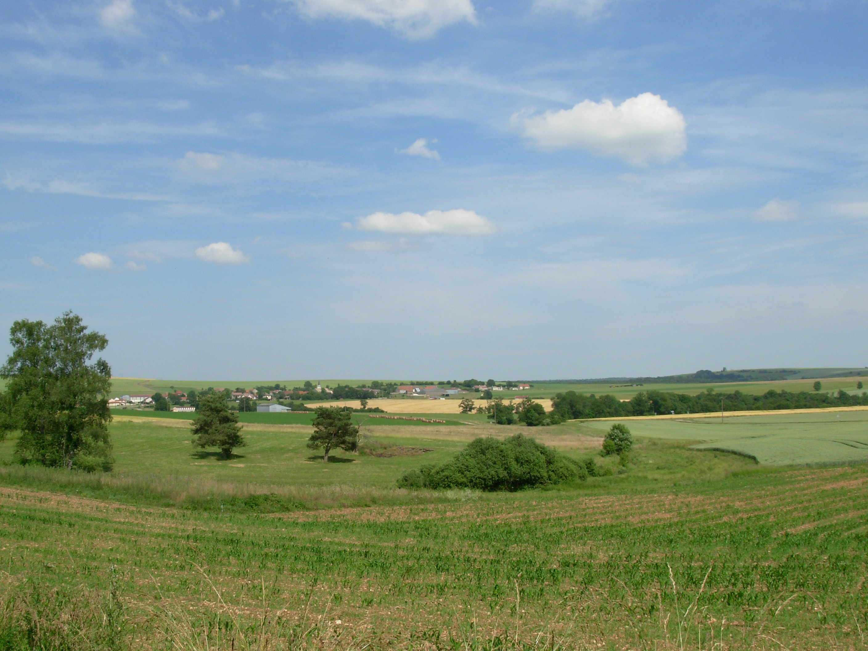 Vue générale du village